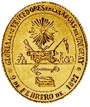 Medalla a los combatientes de Juncal